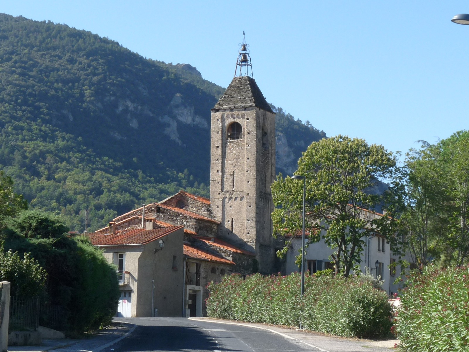 Eglise de Ria, Ria-Sirach, Pyrénées-Orientales, France